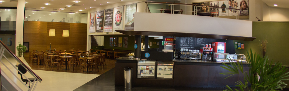 Sptolights do Cine Cena Unijorge